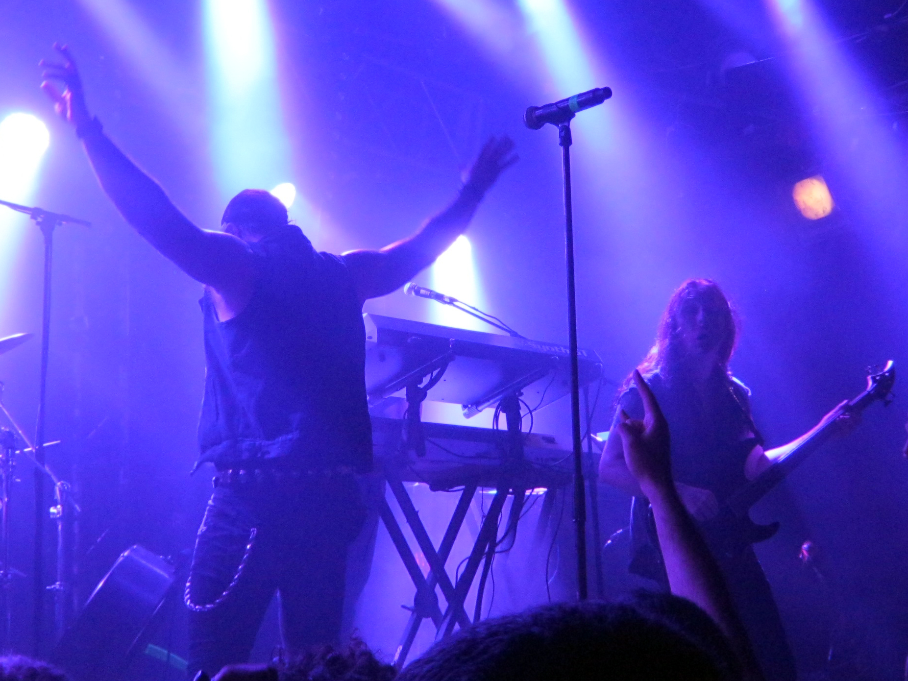 Symphony X at Israel. 10/08/16